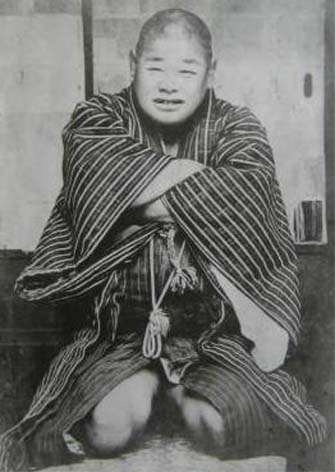 Shiro Sendai(仙台四郎)